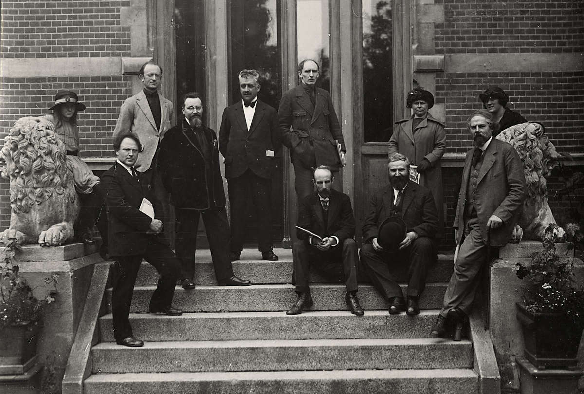 Bestuursleden van de kunstenaarsvereniging "De Onafhankelijken" tijdens de tentoonstelling in het Stedelijk Museum ter gelegenheid van het 10-jarig bestaan. v.l.n.r. M. de Groot (1e voorz), Harmen H. Meurs, Jan de Boer, R. Martinez, Kees Heijnsius, H.F. Boot (1e secr), D.B. Nanninga en Jan Visser. Nederland, Amsterdam, 1922.